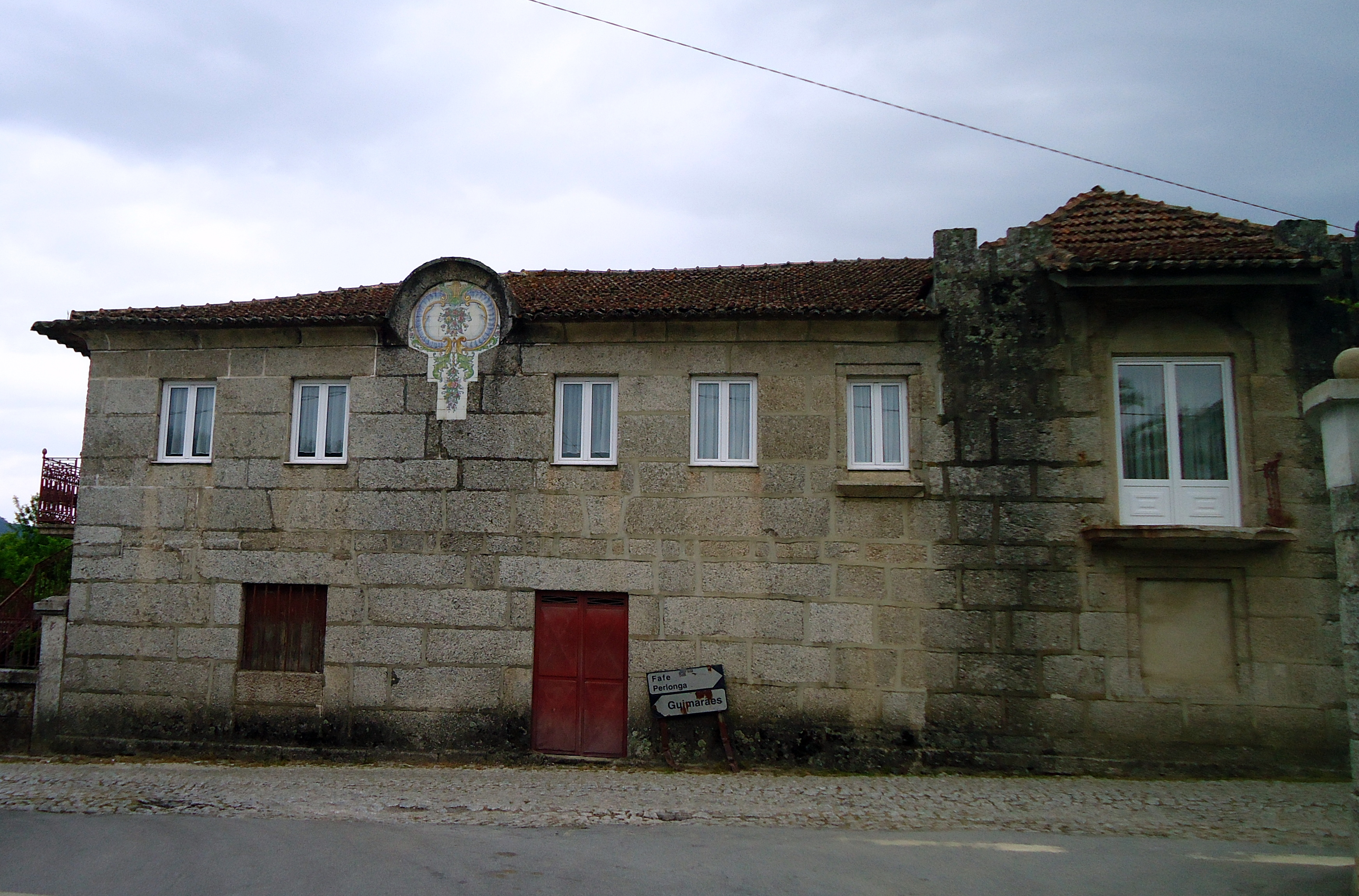 Casa Rural Felgueiras Jugueiros